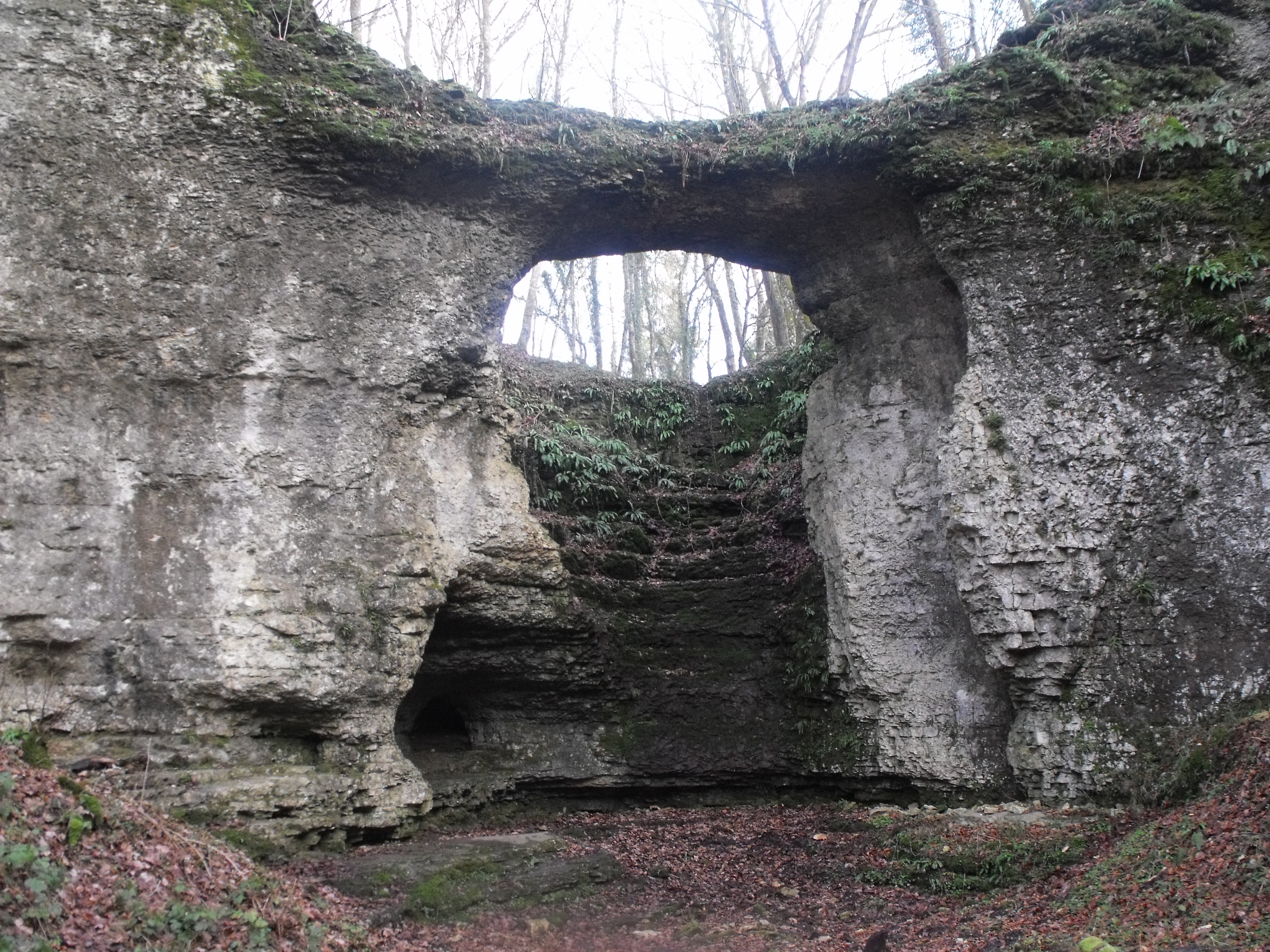 Pont Sarrazin, Vandoncourt, Doubs, France